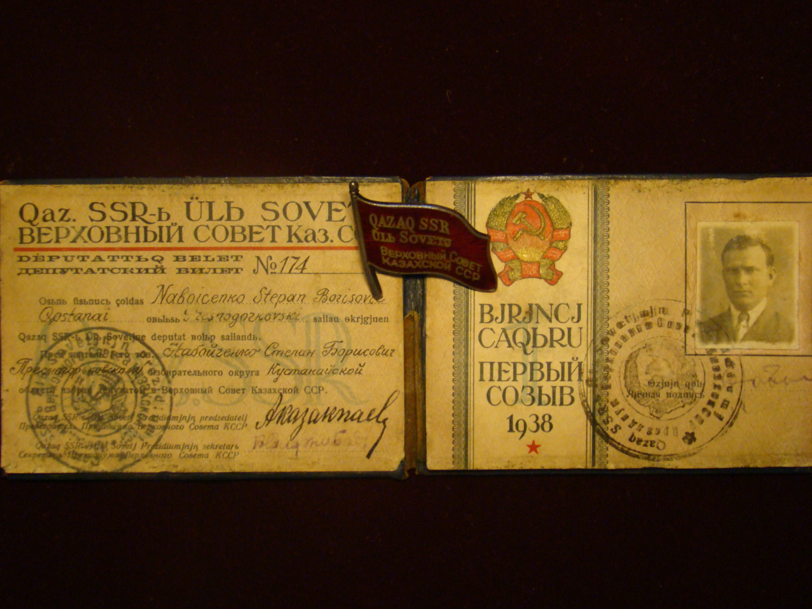 Депутатский билет Набойченко.С.Б. №174